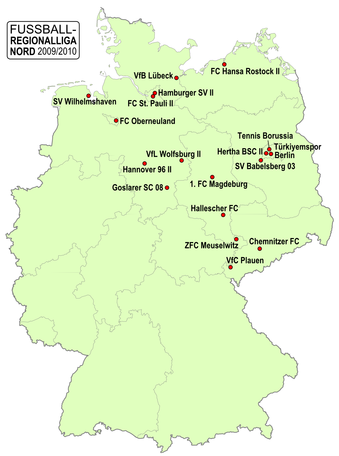 Karte der Vereine der Fußball-Regionalliga Nord, Saison 2009/2010